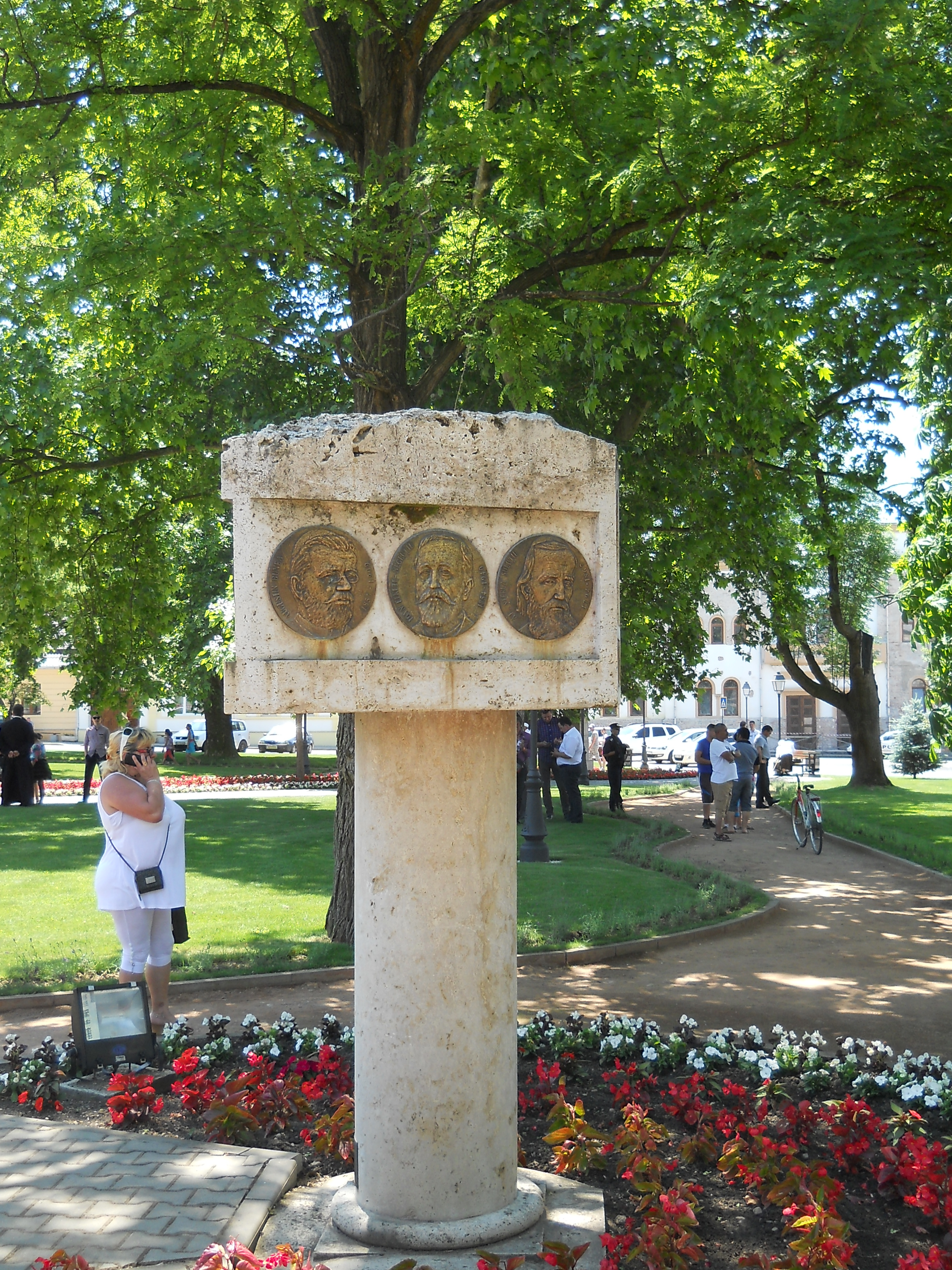 Monumentul Horia, Cloşca şi Crişan din Blaj